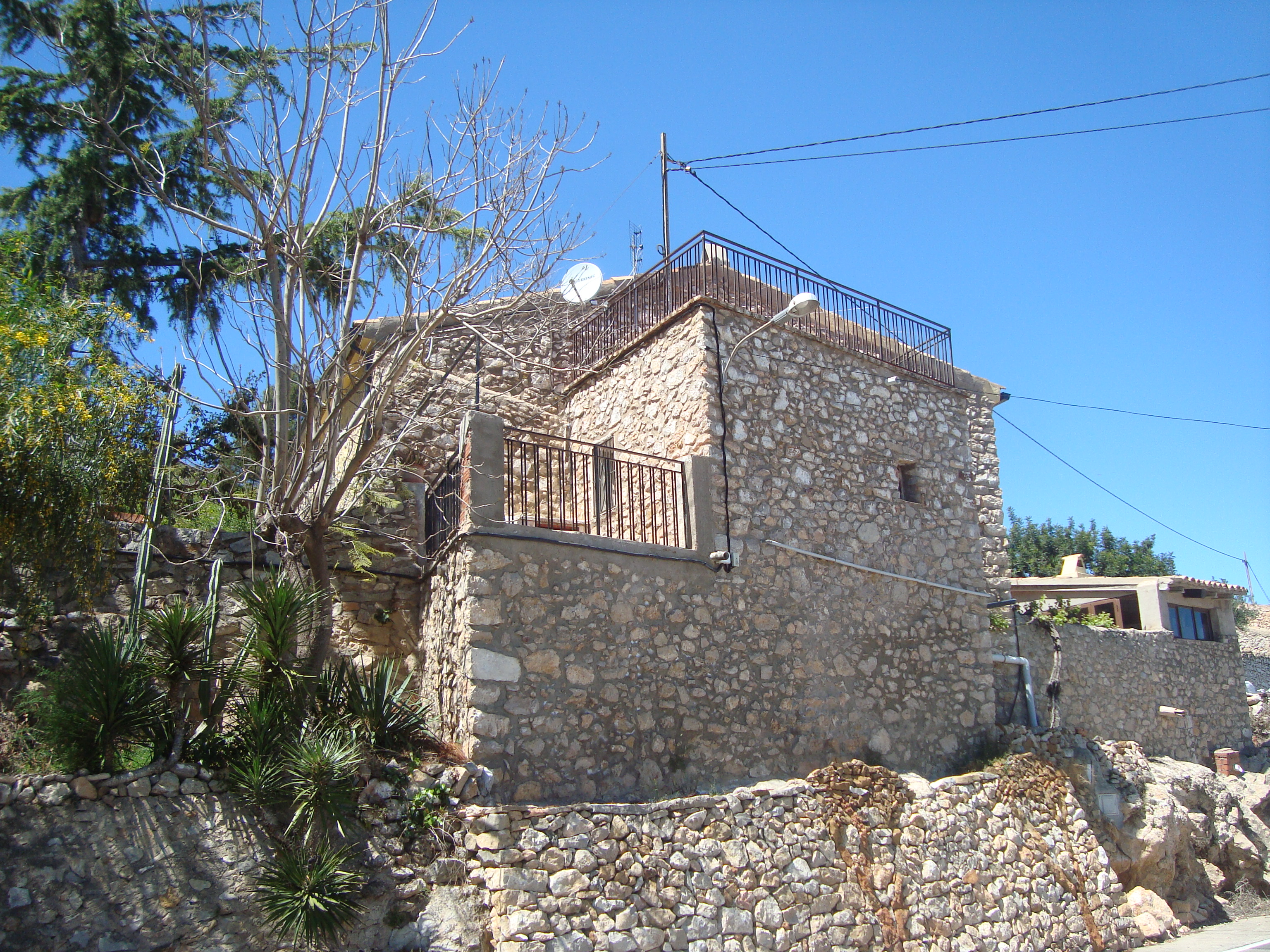 Casa de Mas D'Avall (Costur)